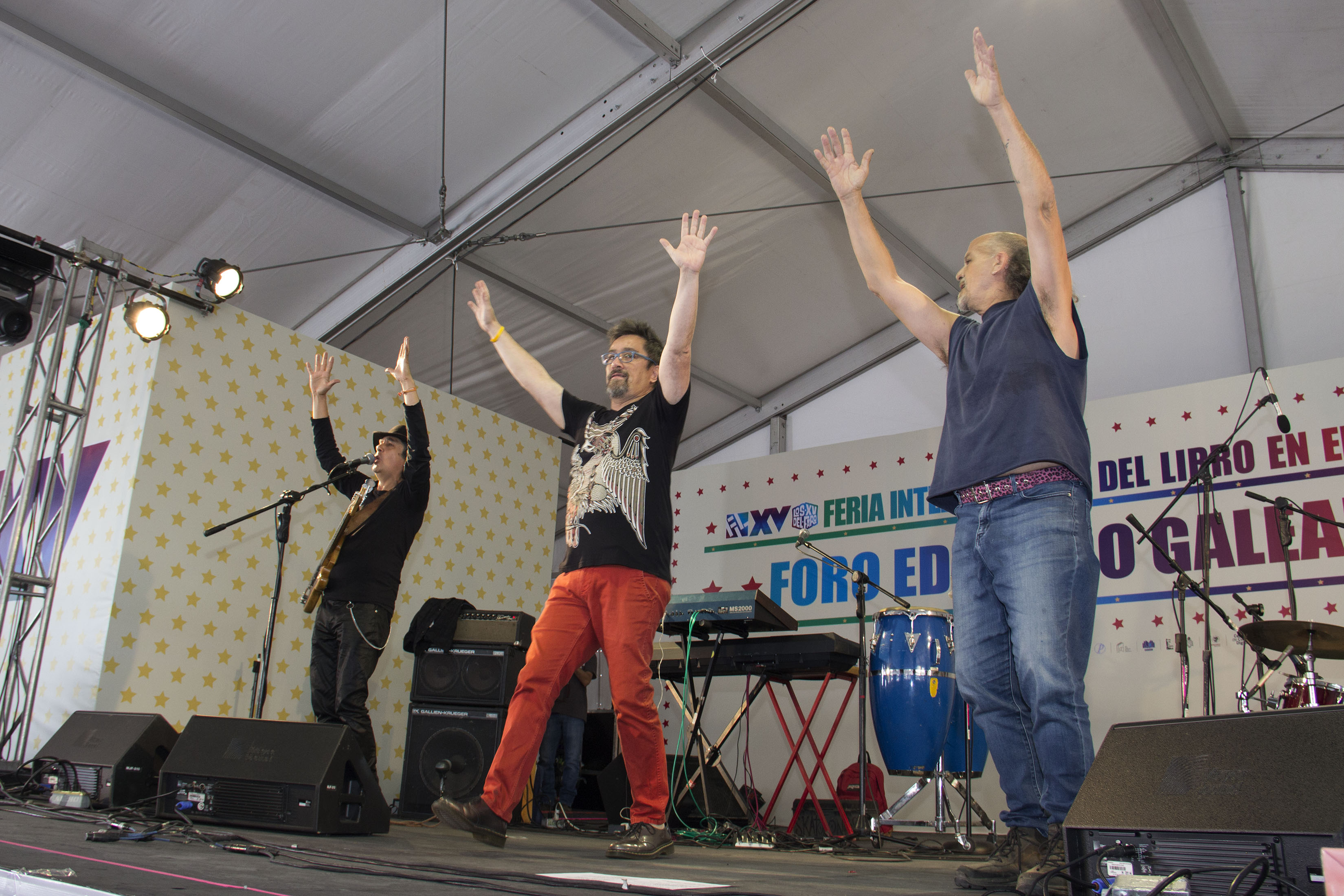 Sabado, 10 de octubre 2015. Concierto del grupo de rock mexicano Botellita de Jerez en el Foro Eduardo Galeano de la XV FILZ. Foto: Jesus Martinez / Secretaría de Cultura